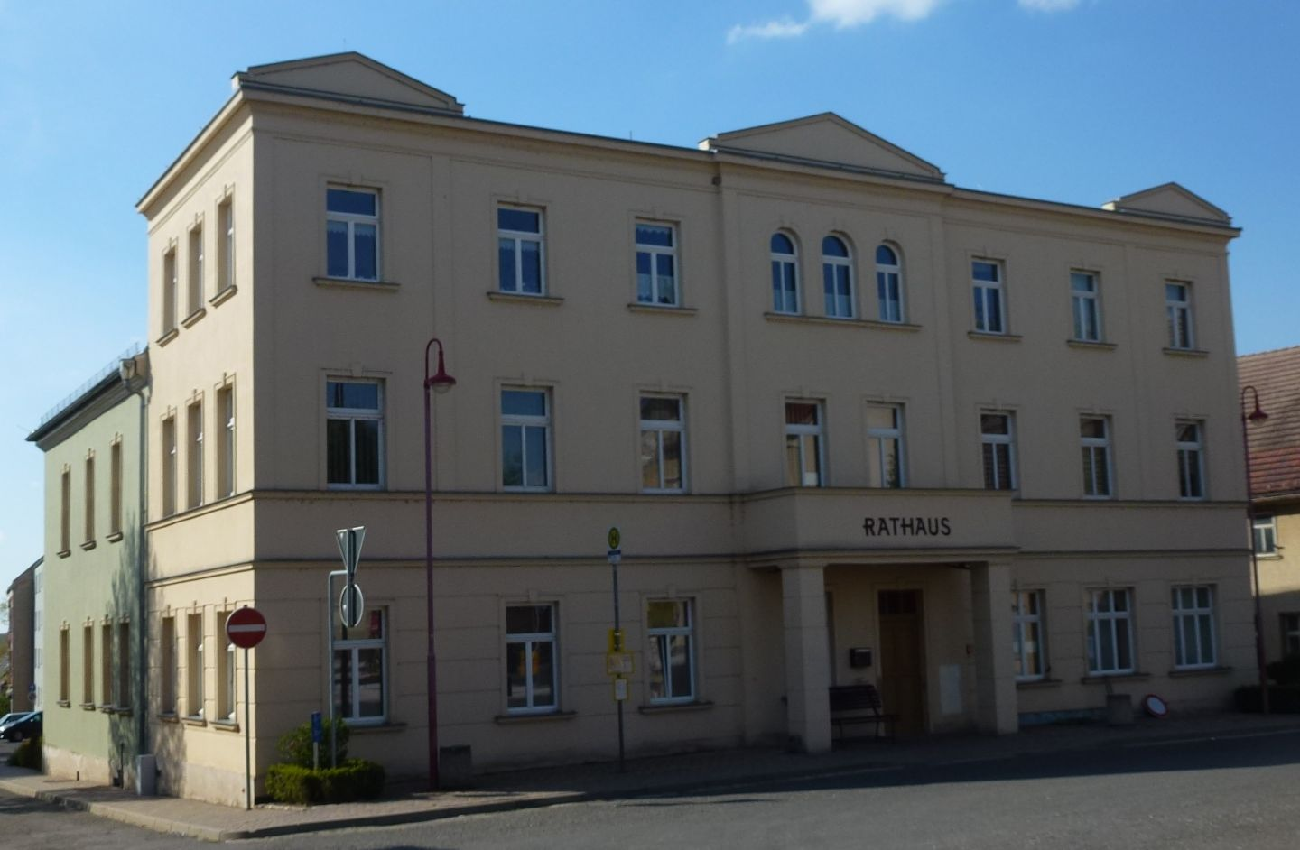 Rathaus in Osterfeld (bei Naumburg), Sachsen-Anhalt